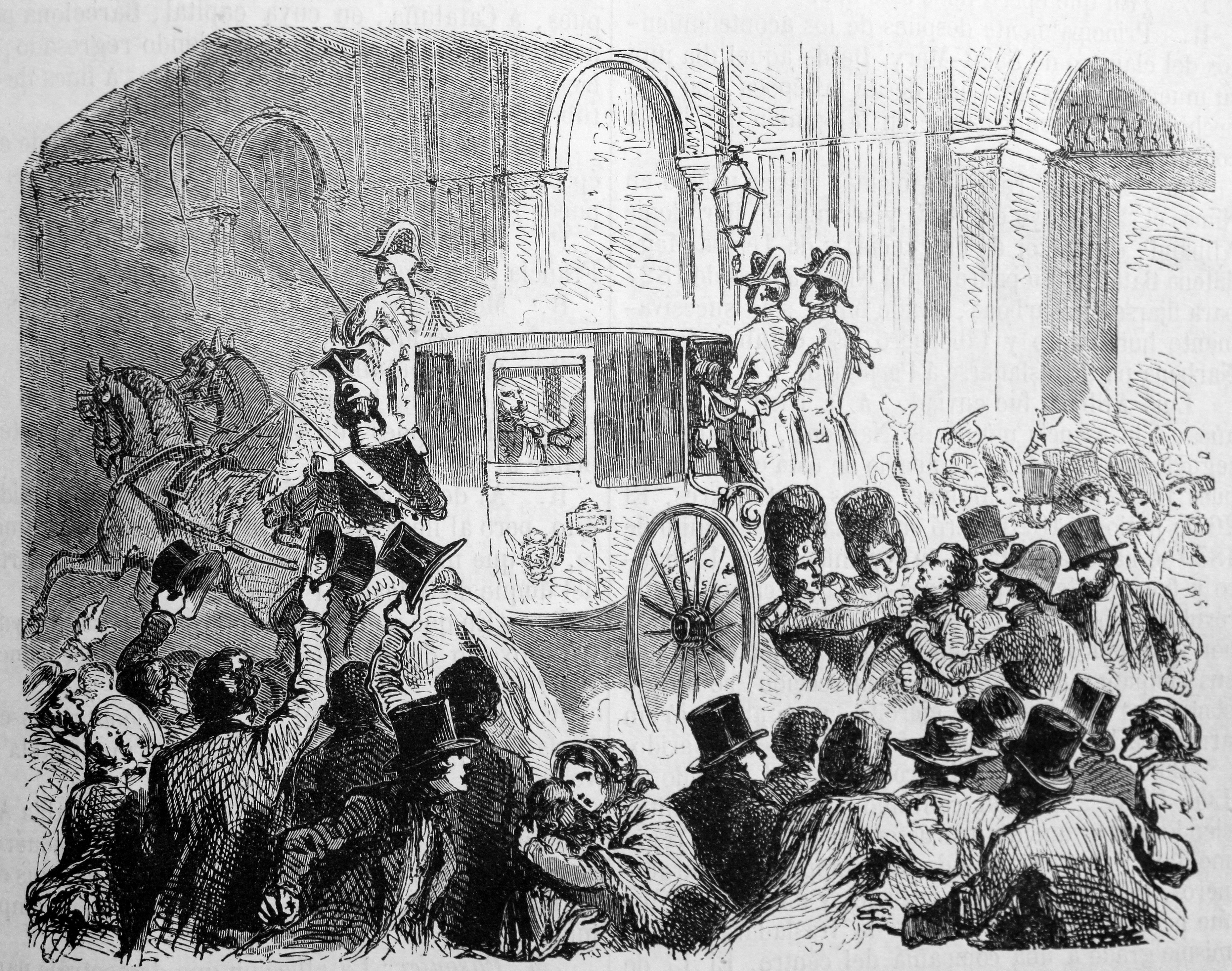 Ilustraciones de la obra : Anales dramáticos del crimen ó Causas célebres españolas y estranjeras [sic] / estractadas [sic] de los originales y traducidas, bajo la dirección de José de Vicente y Caravantes. - Madrid : Imprenta de Fernando Gaspar [etc.], 1858-1866. - Ed. il. con grabados... "Los regicidas. Luis Alibaud (1836). Arresto de Alibaud".